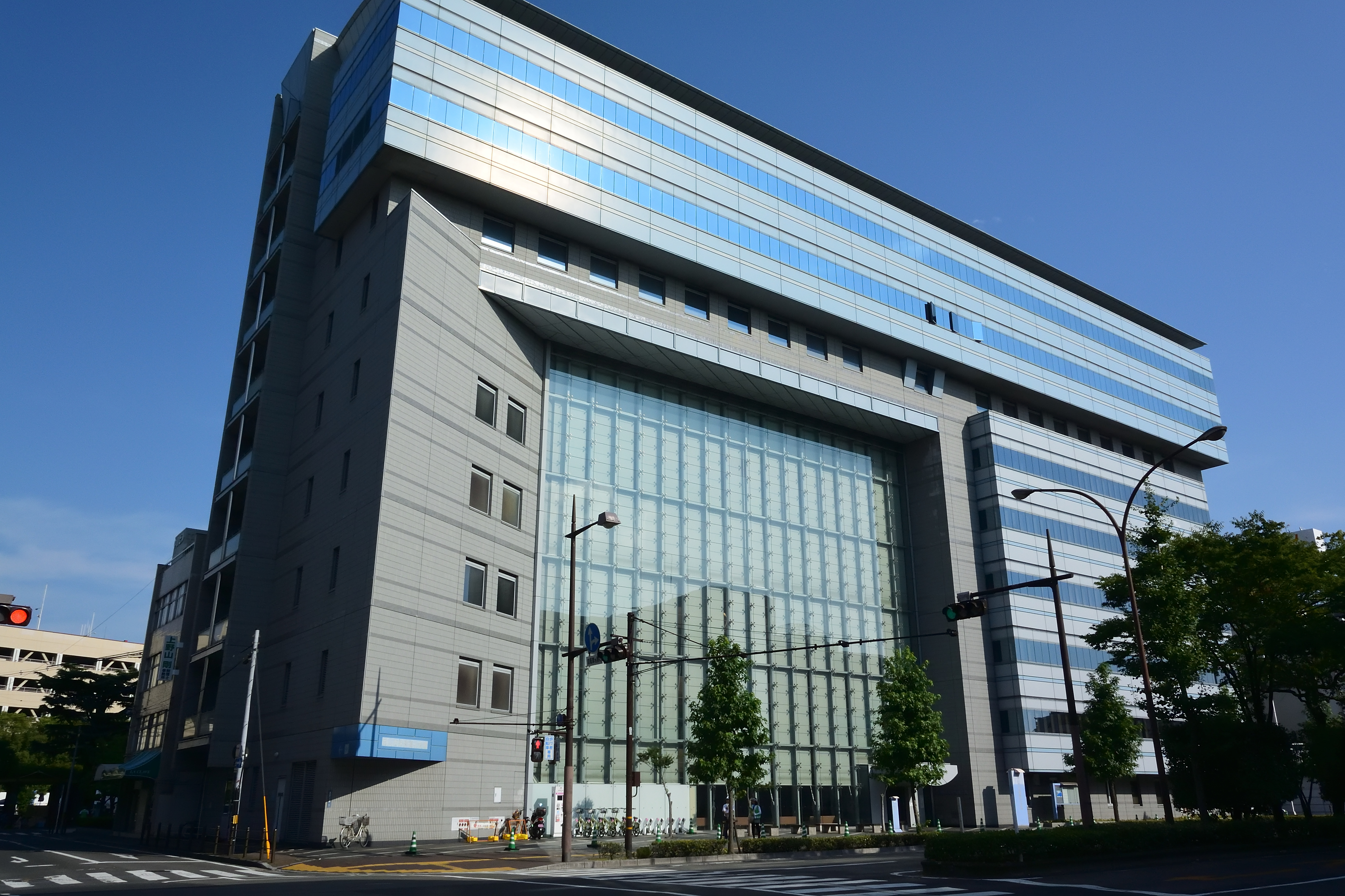 岡山市保健福祉会館